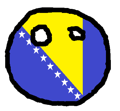 Polandball de Bosnia-Herzegovina